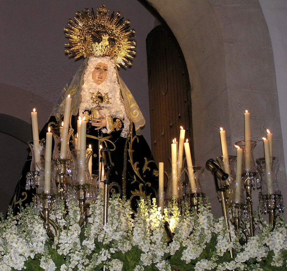 Procesión de la Santísima Virgen de los Dolores, el Jueves Santo